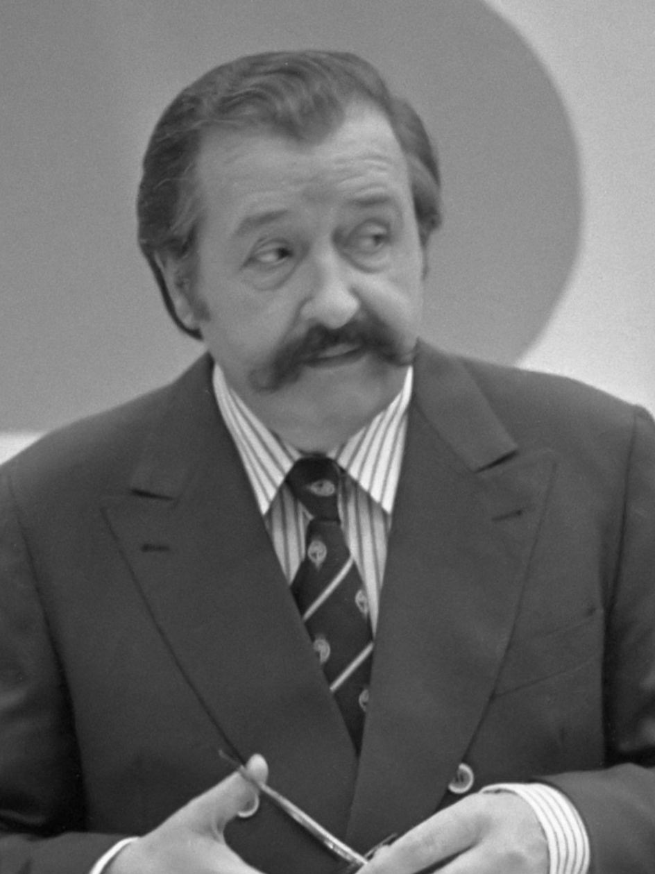 Peter Knegjens presenteert de AVRO televisiequiz "Wie-kent kwis " 11 januari 1974